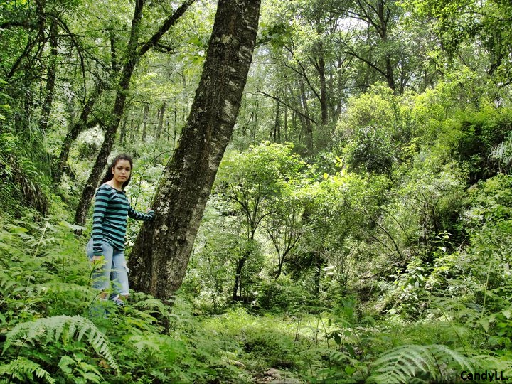 Selva de Yungas en Catamarca.